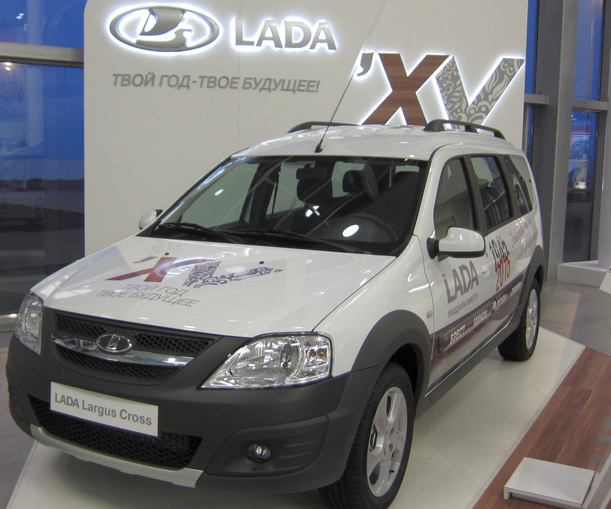 Presentation of the new Lada 'XV at the Kurumoch International Airport